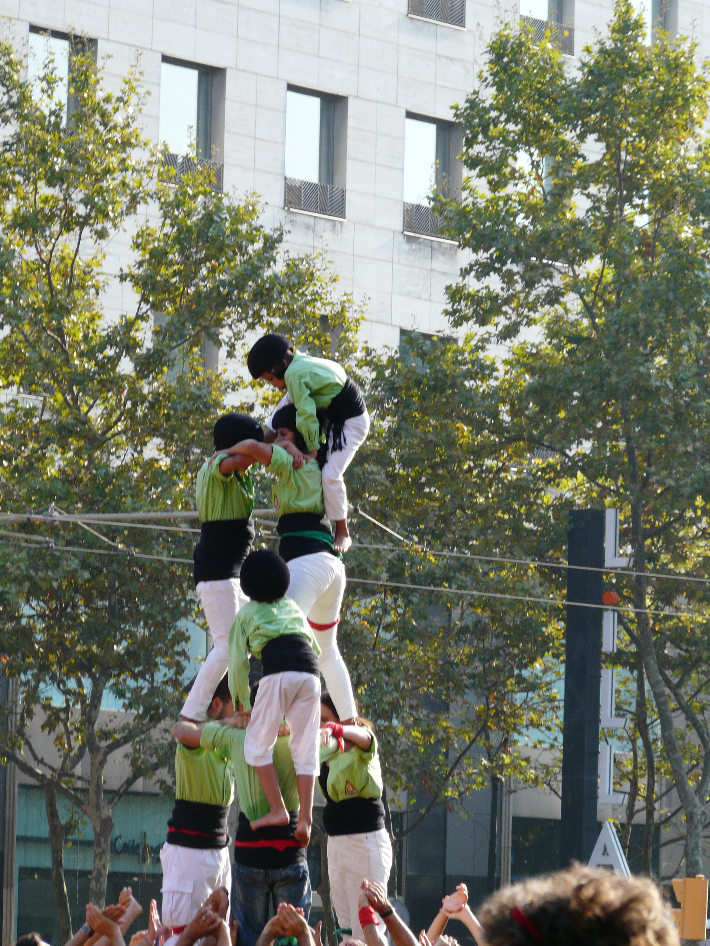 Edifici Illa Diagonal. Av. Diagonal, 545-575 (Barcelona). Object location41° 23′ 22.36″ N, 2° 08′ 07.11″ E